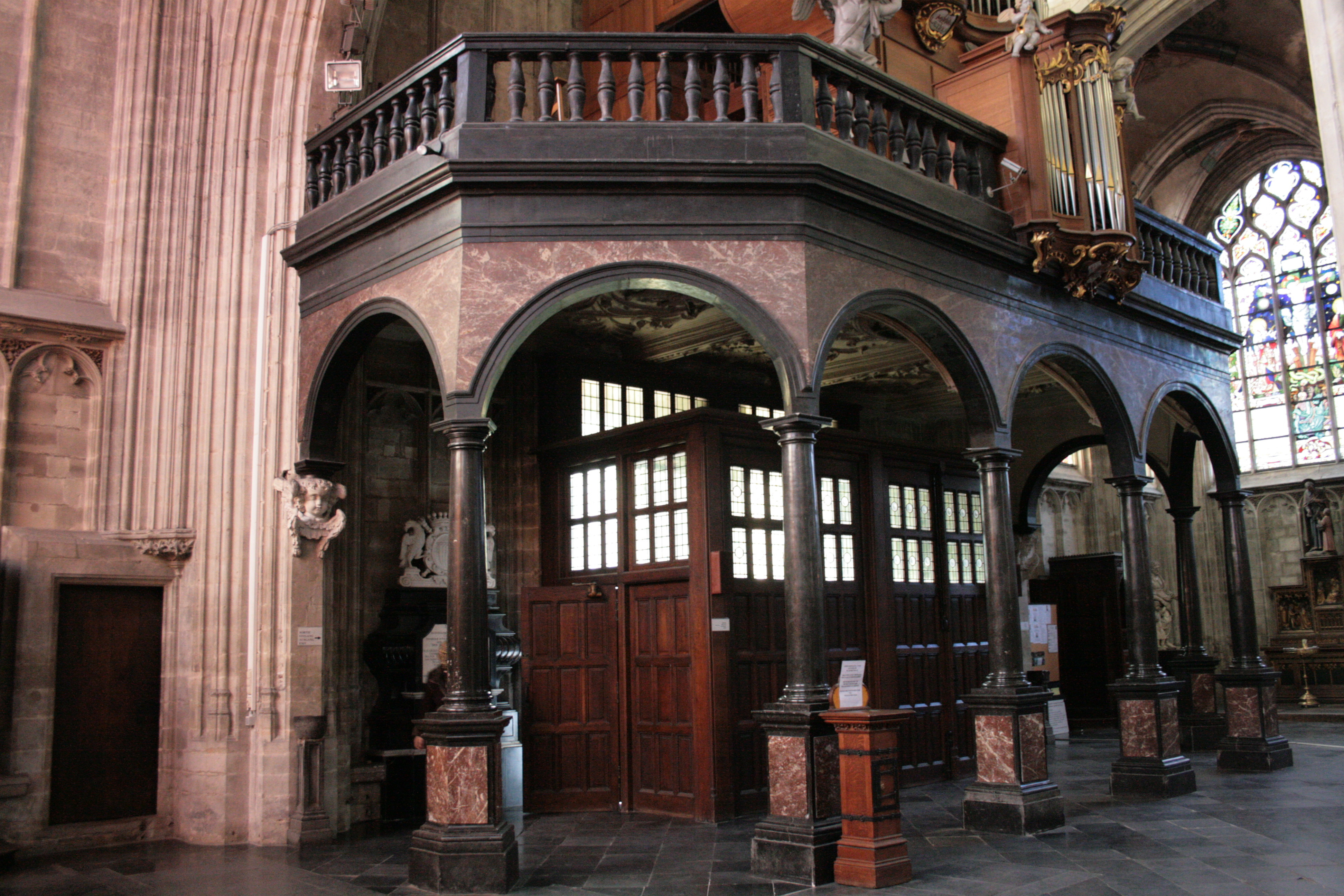 Église Notre-Dame du Sablon, Bruxelles, Belgique. Jubé bordé d'une ballustrade